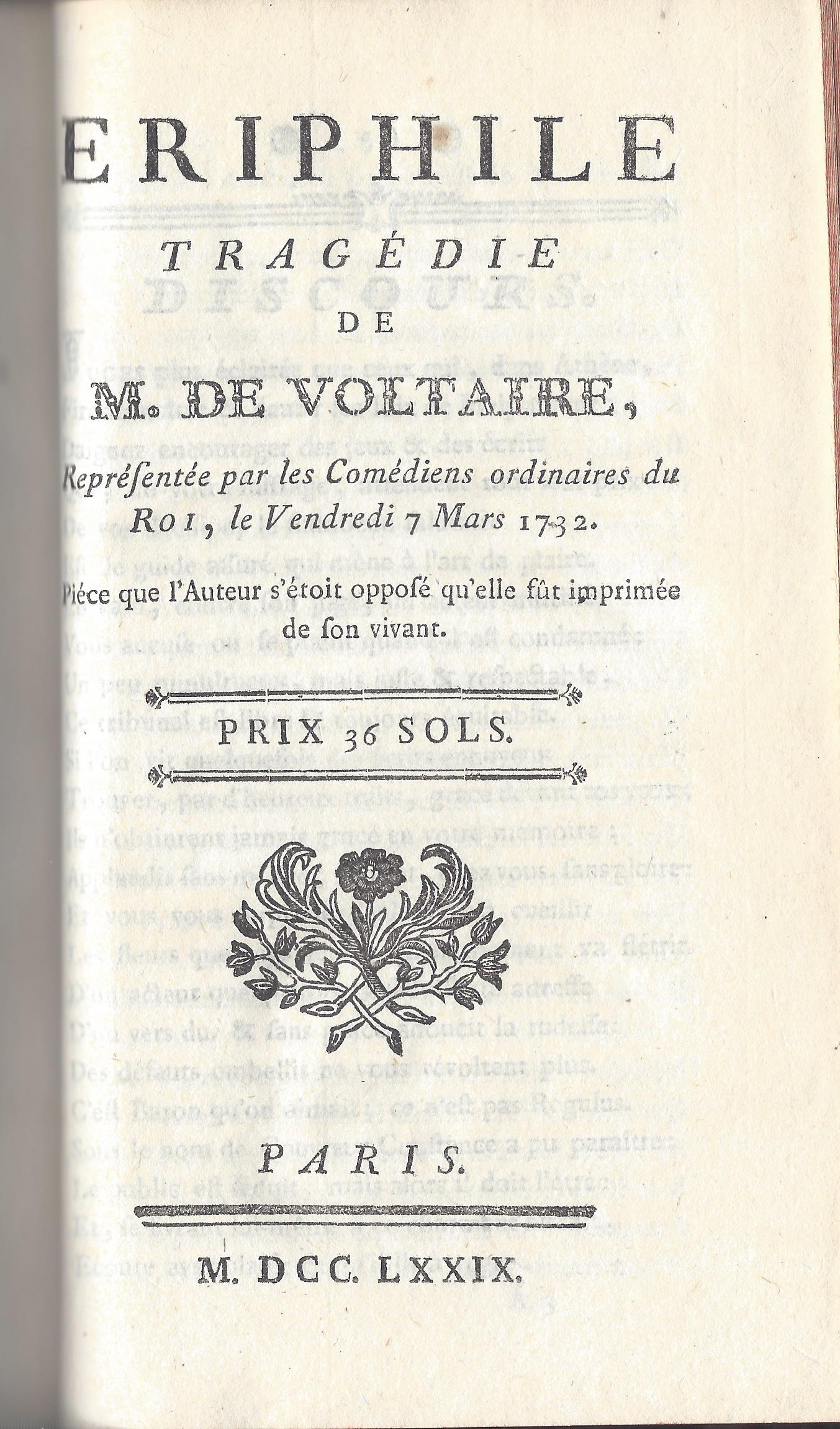 Titelblatt der posthum erschienenen ersten Ausgabe von Voltaires Ériphyle, Paris, ohne Verleger, 1779.